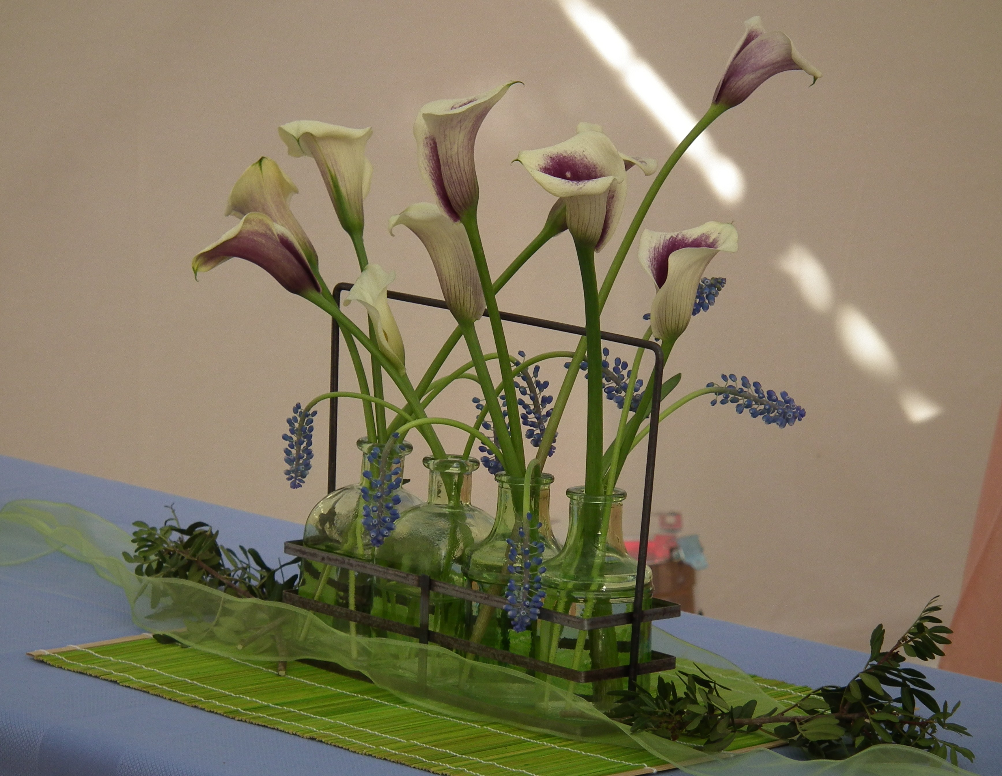 Blumendekoration mit Calla (Zantedeschia)